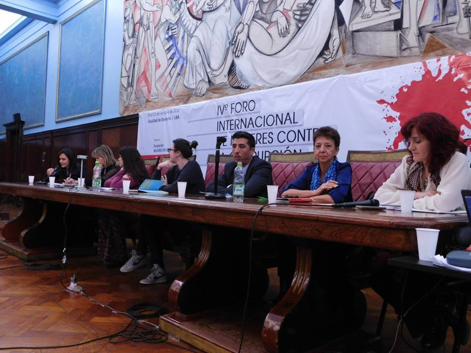 Anna Torres en el panel de Mujeres en Igualdad